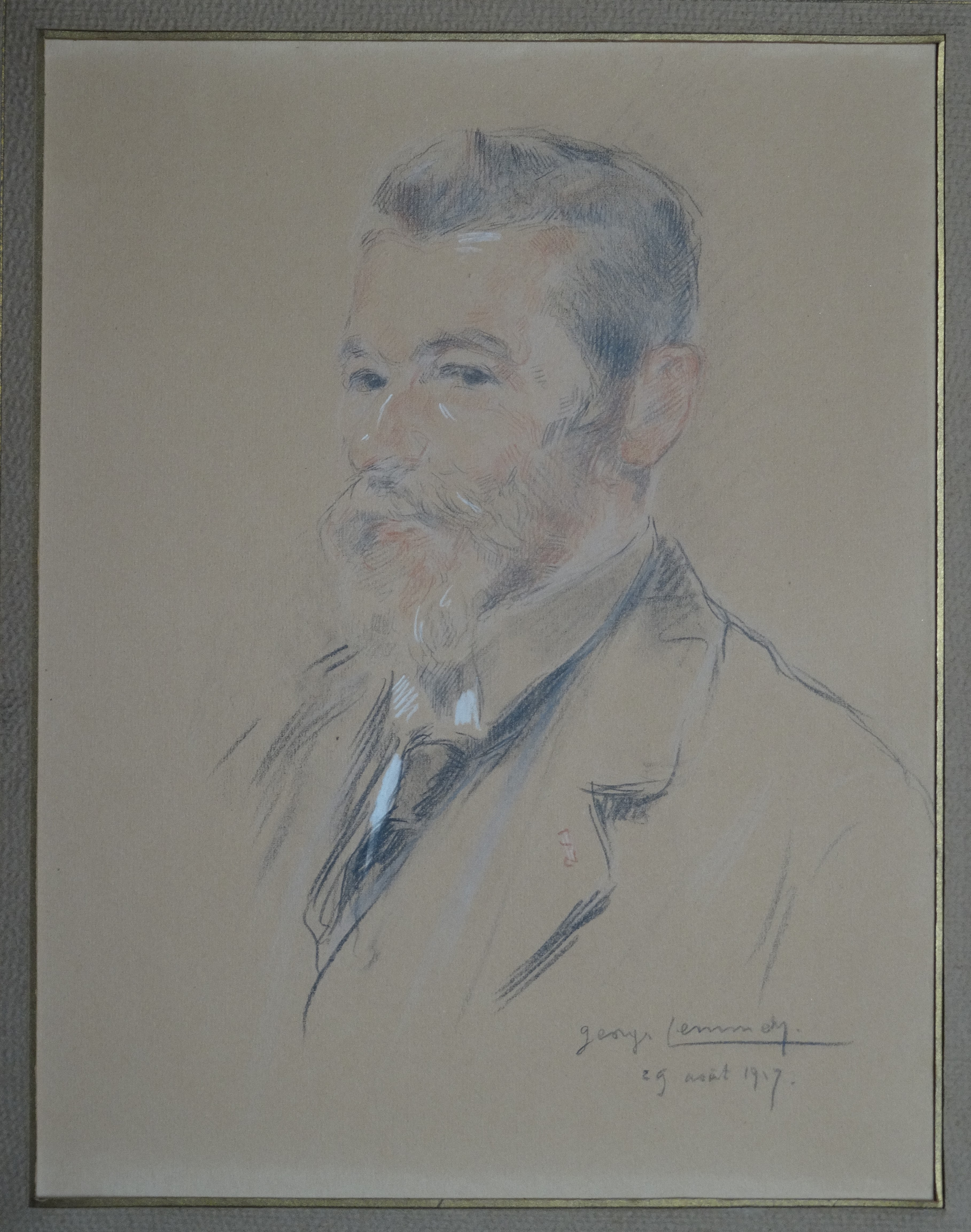 Dessin de Georges Lemmers, representant Léandre Grandmoulin, fusain et craie blanche sur papier brun, 29/08/1917, H 31 cm x L 24 cm, collection privé